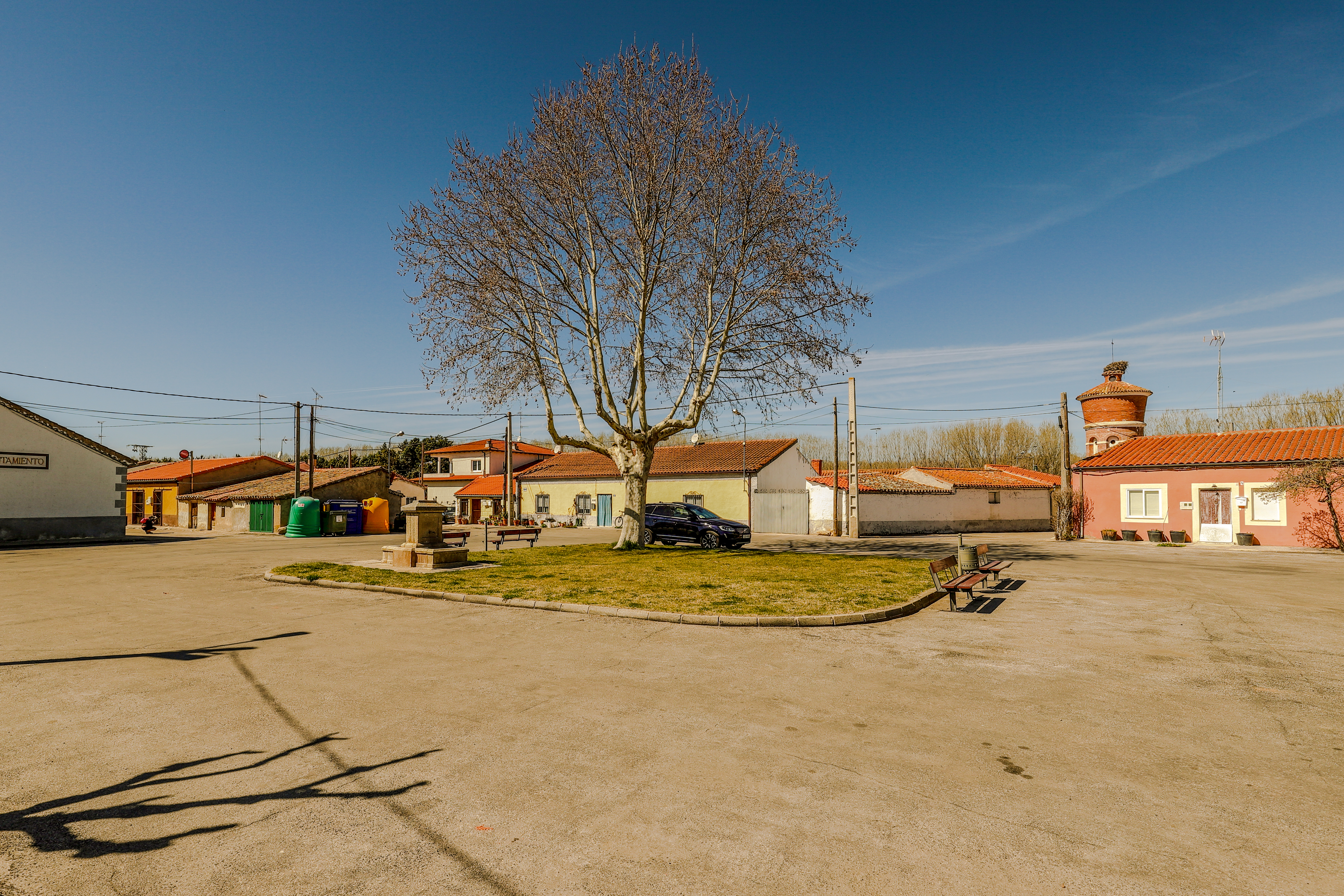 Galisancho es un municipio de la comarca Tierra de Alba, en la provincia de Salamanca.